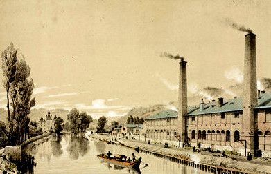 Lithografie der Zinkwerke der Vieille Montagne in Angleur bei Lüttich